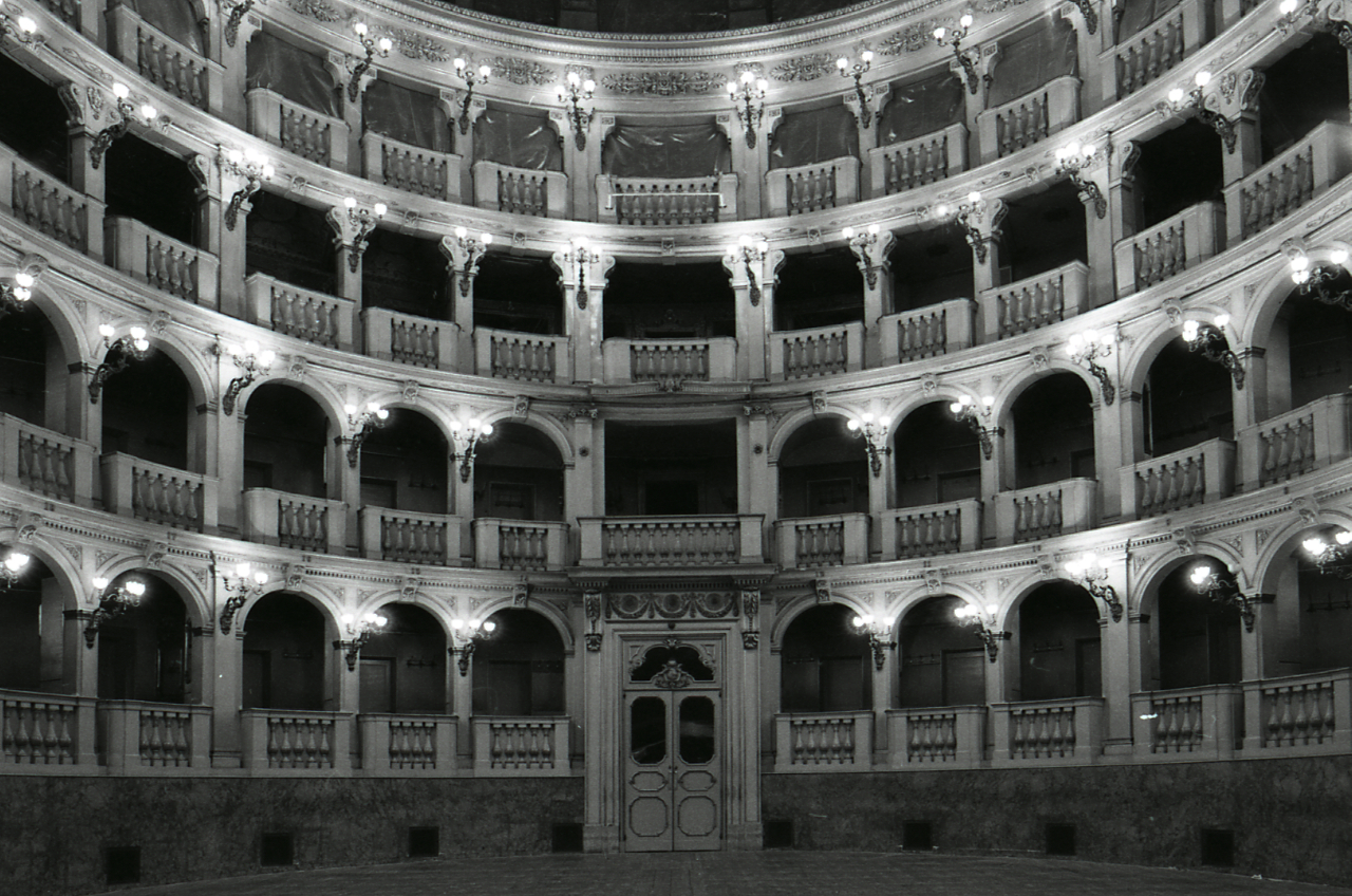 Servizio fotografico : Bologna, 1980 / Paolo Monti. - Strisce: 4, Fotogrammi complessivi: 17 : Negativo b/n, gelatina bromuro d'argento/ pellicola ; 35 mm. - ((Sul portanegativi: N[I]K[MA]T FP4. - La serie è identificata da Monti con segni grafici e distinta dalla precedente. - Occasione: Documentazione per i lavori di restauro. - Fonte: Agenda di Paolo Monti: Nikon Leika 3001-/ Monti 1978 (1978), presso Archivio Paolo Monti